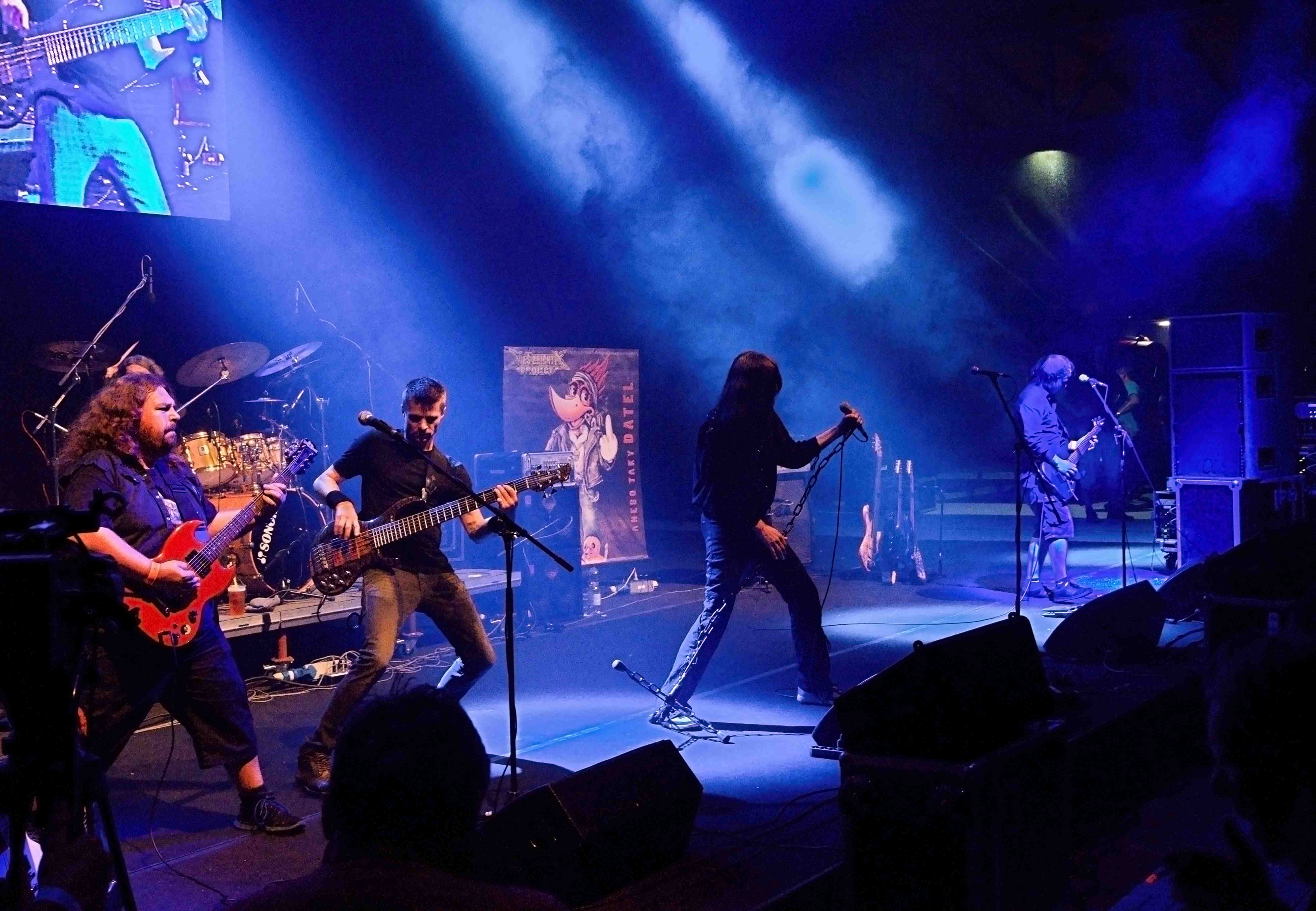 Skupina Aleš Brichta Project